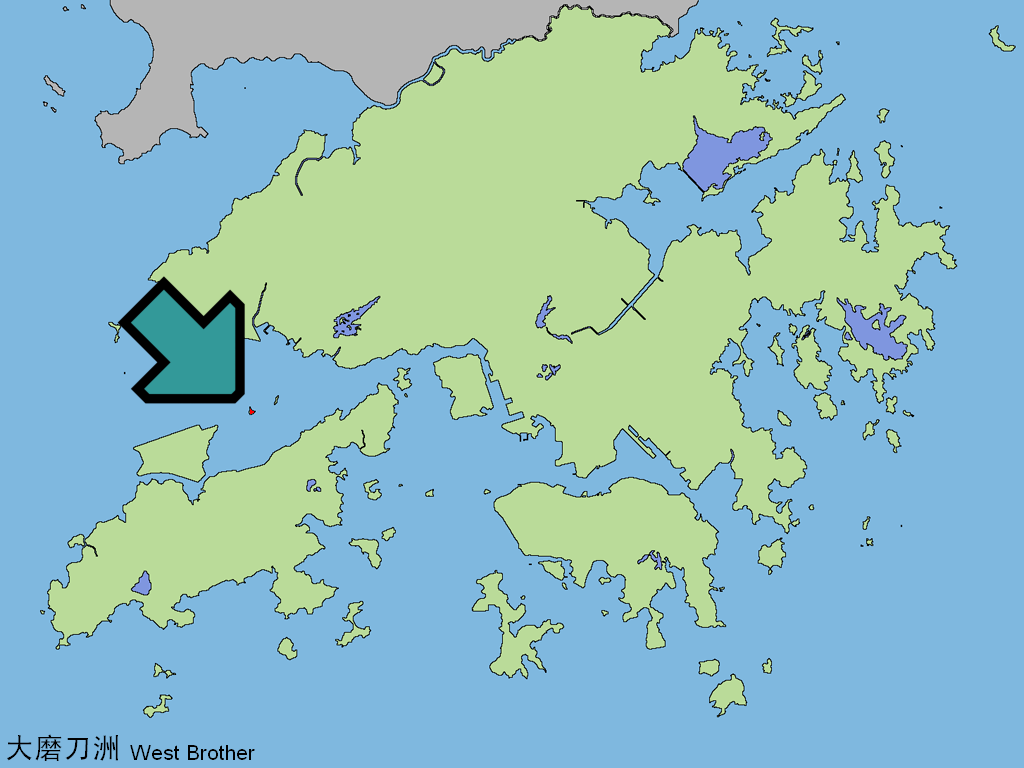 中文（香港）: 大磨刀洲。